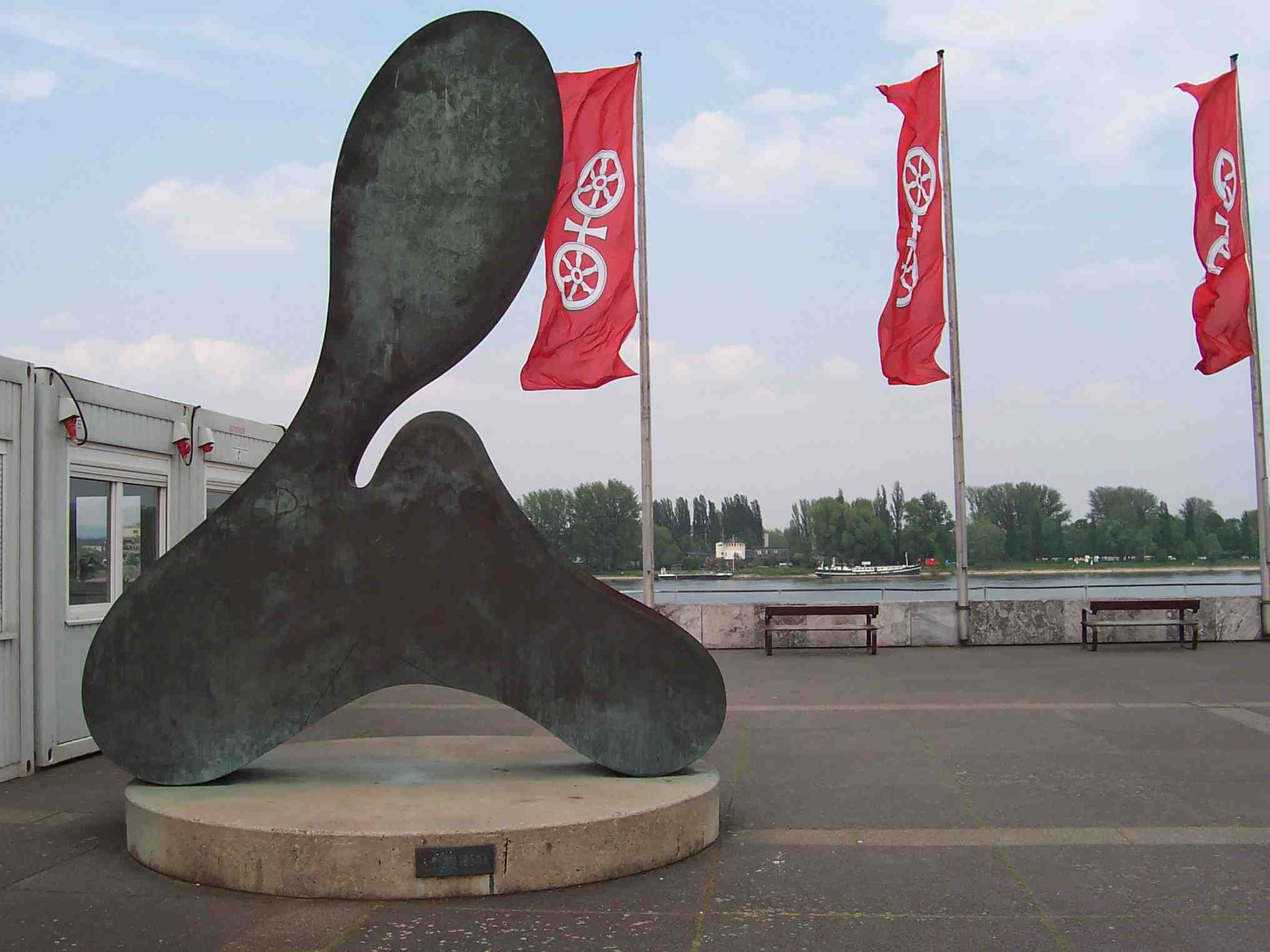 Hans Arp: Schlüssel des Stundenschlägers - Standort: Mainz auf dem Rathausplatz - Bronze, achtfach vergrößerter Nachguss. Geschenk der Landesregierung Rheinland-Pfalz an die Stadt Mainz (1974). Ausgeliehen an das Arp Museum